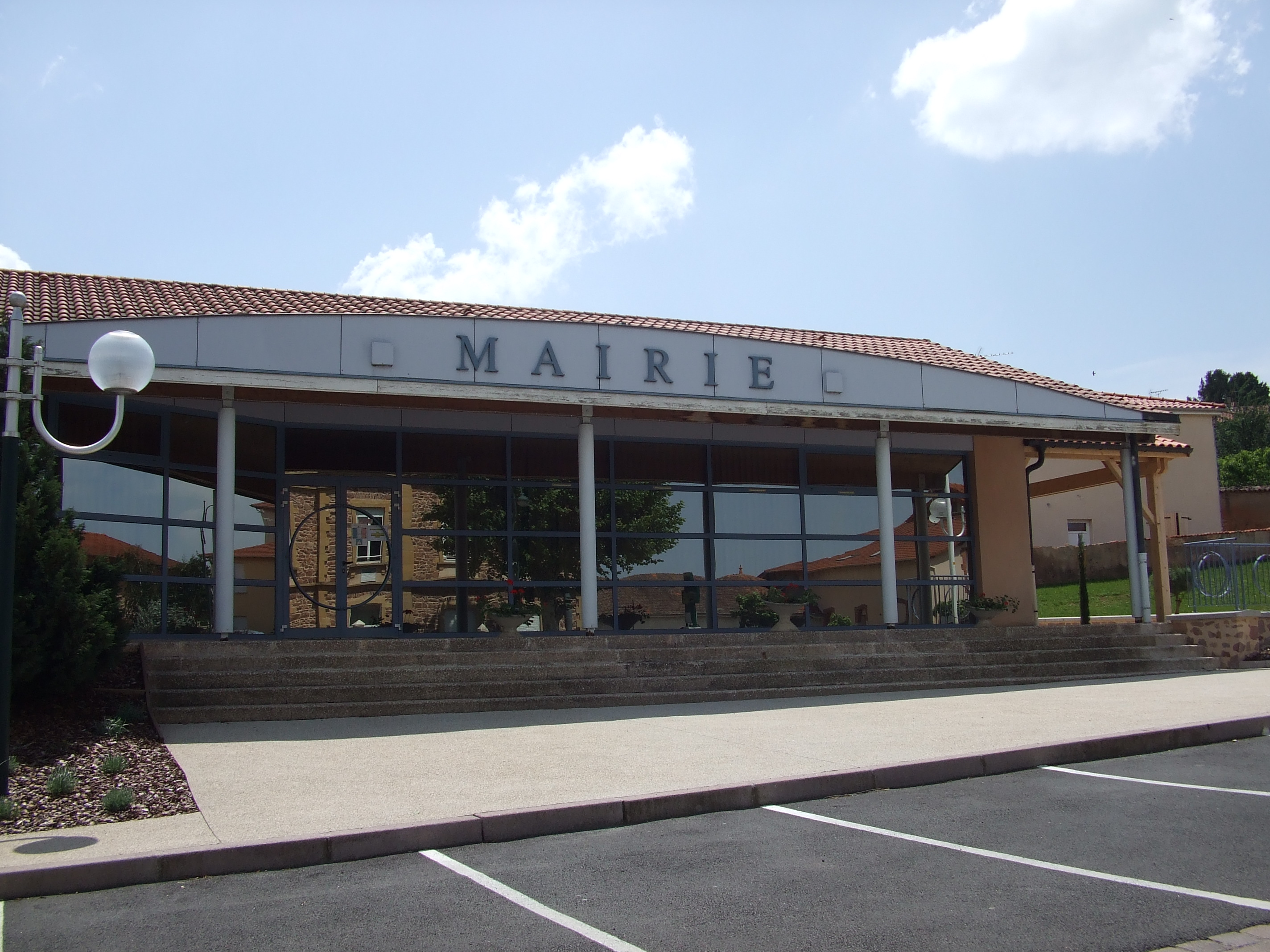 Mairie de Coutouvre (France - Loire)